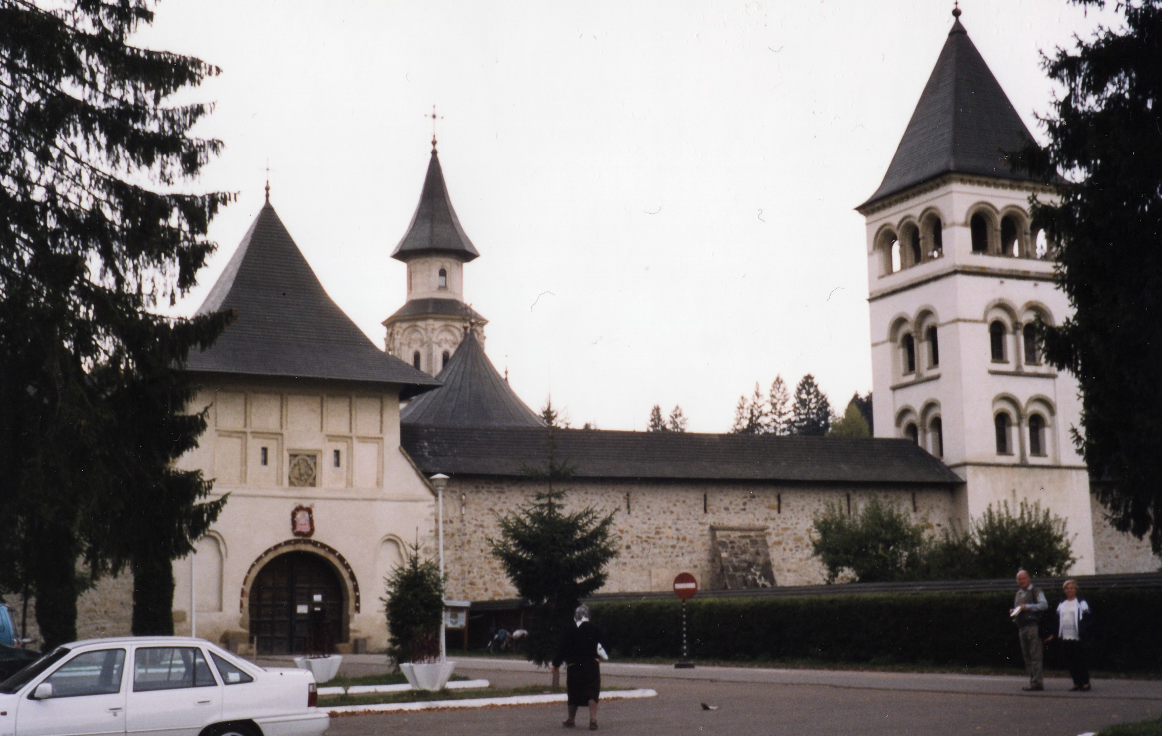 Putna, Románia: Kolostor, külső kép